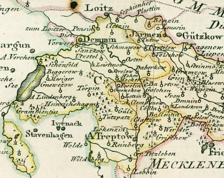 Ausschnitt aus "Landkarte des Herzogtums Vor- und Hinterpommern aus dem Jahr 1794"